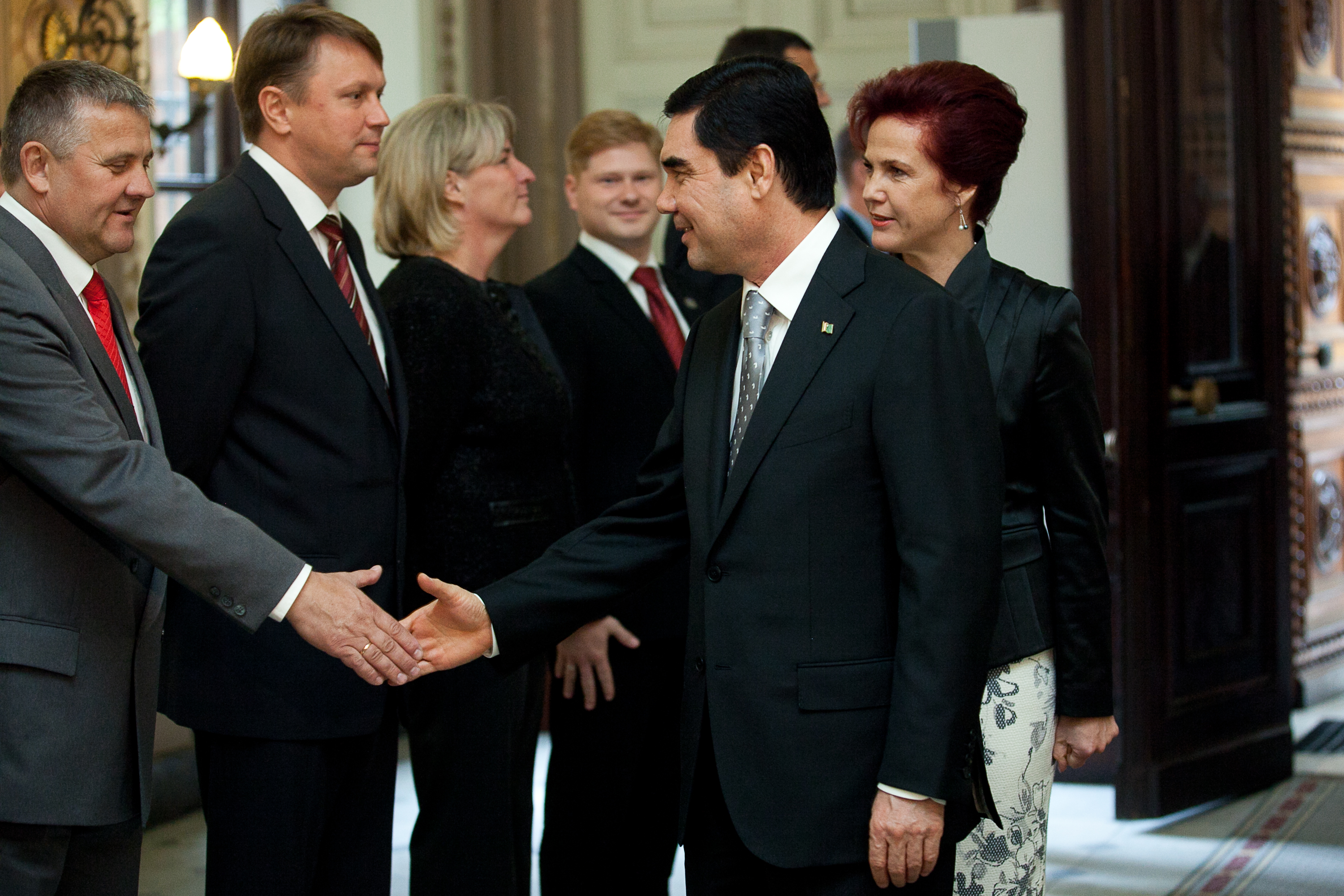 2012.gada 11.septembris. Saeimas priekšsēdētāja Solvita Āboltiņa tiekas ar Turkmenistānas prezidentu Gurbanguli Berdimuhamedovu. Foto: Ernests Dinka, Saeimas Kanceleja